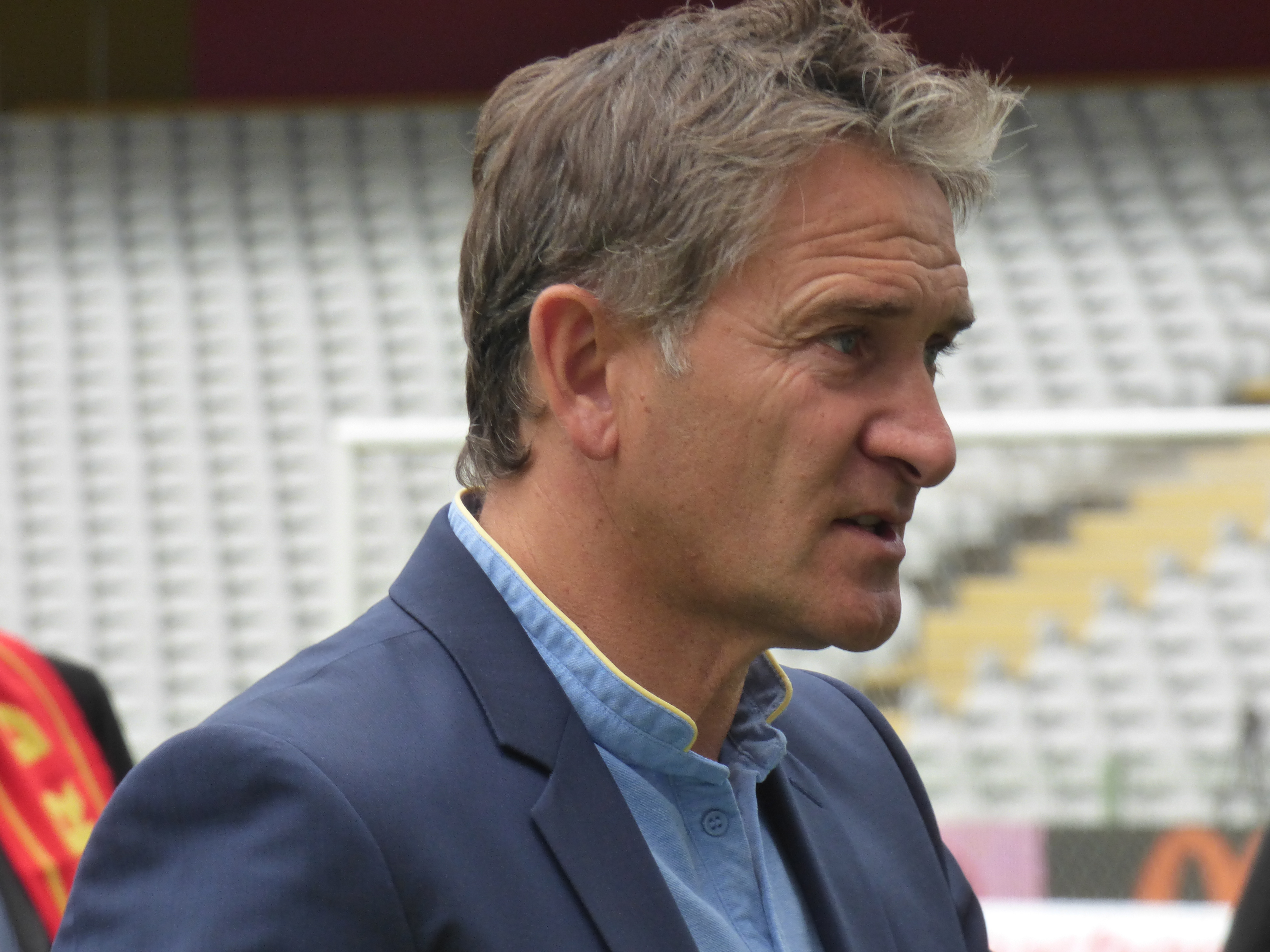 Philippe Montanier avant le match Lens / Sochaux, comptant pour la septième journée du championnat de France de football de Ligue 2, le 15 septembre 2018.